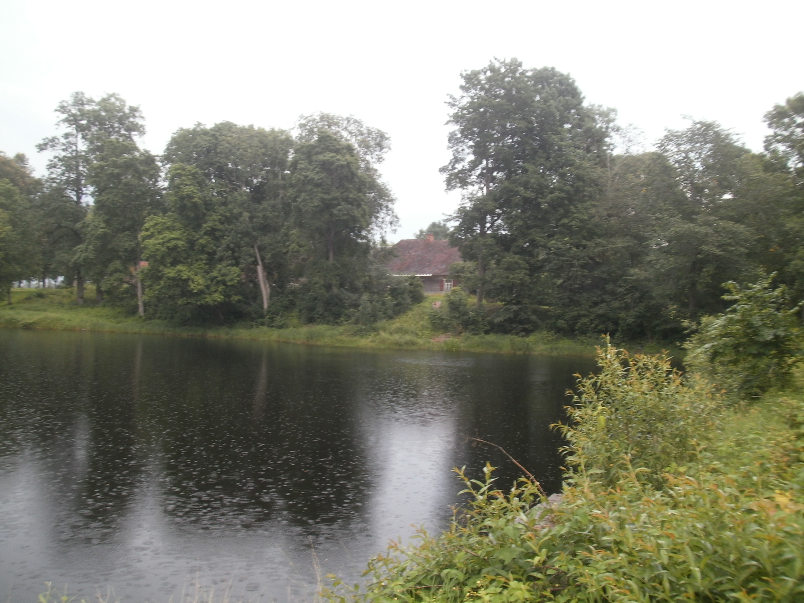 Mõisatiik ja linnusevalli läänekülg, 2014 juuli.